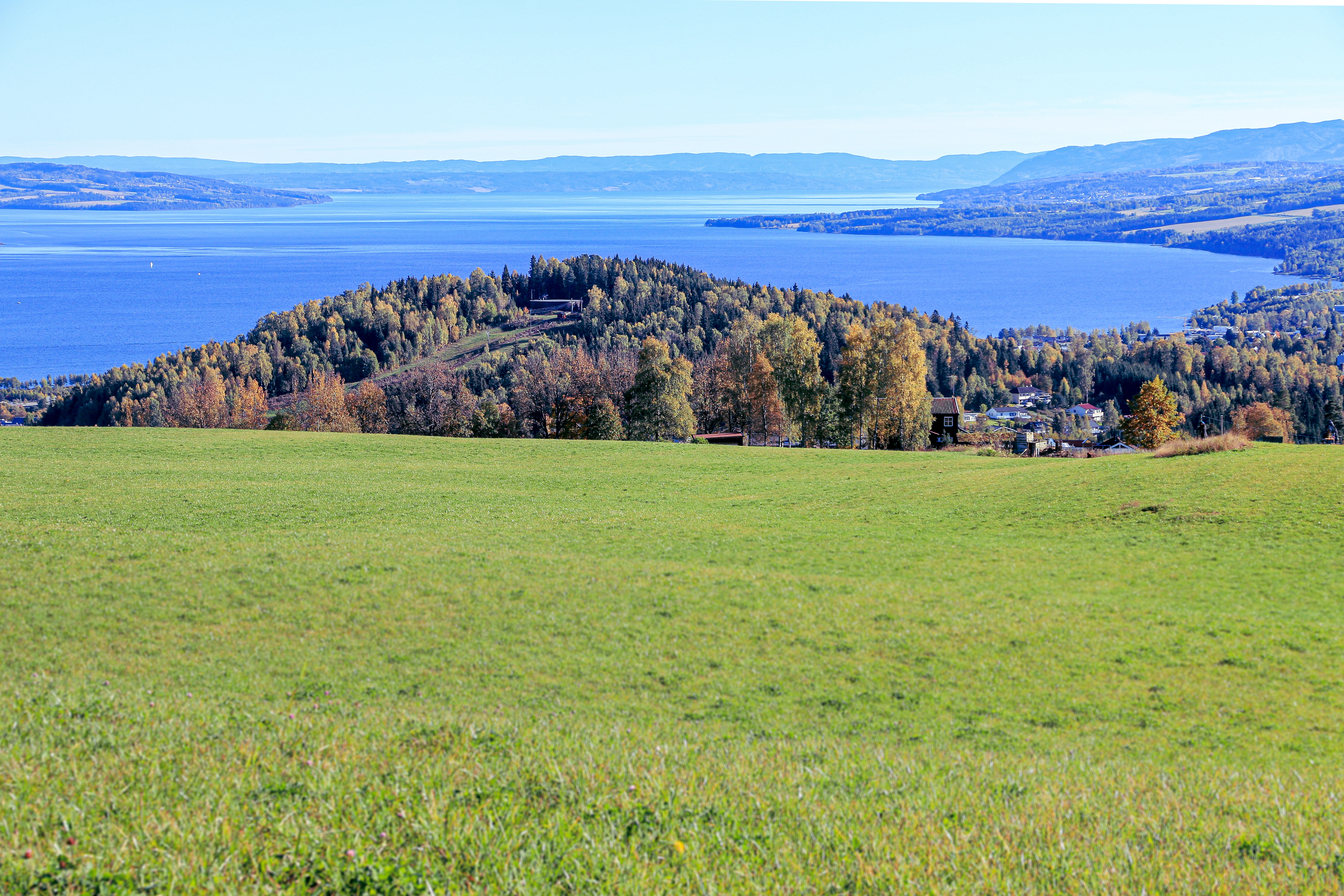 Hovdetoppen i Gjøvik med Mjøsa sett fra Eiktunet.